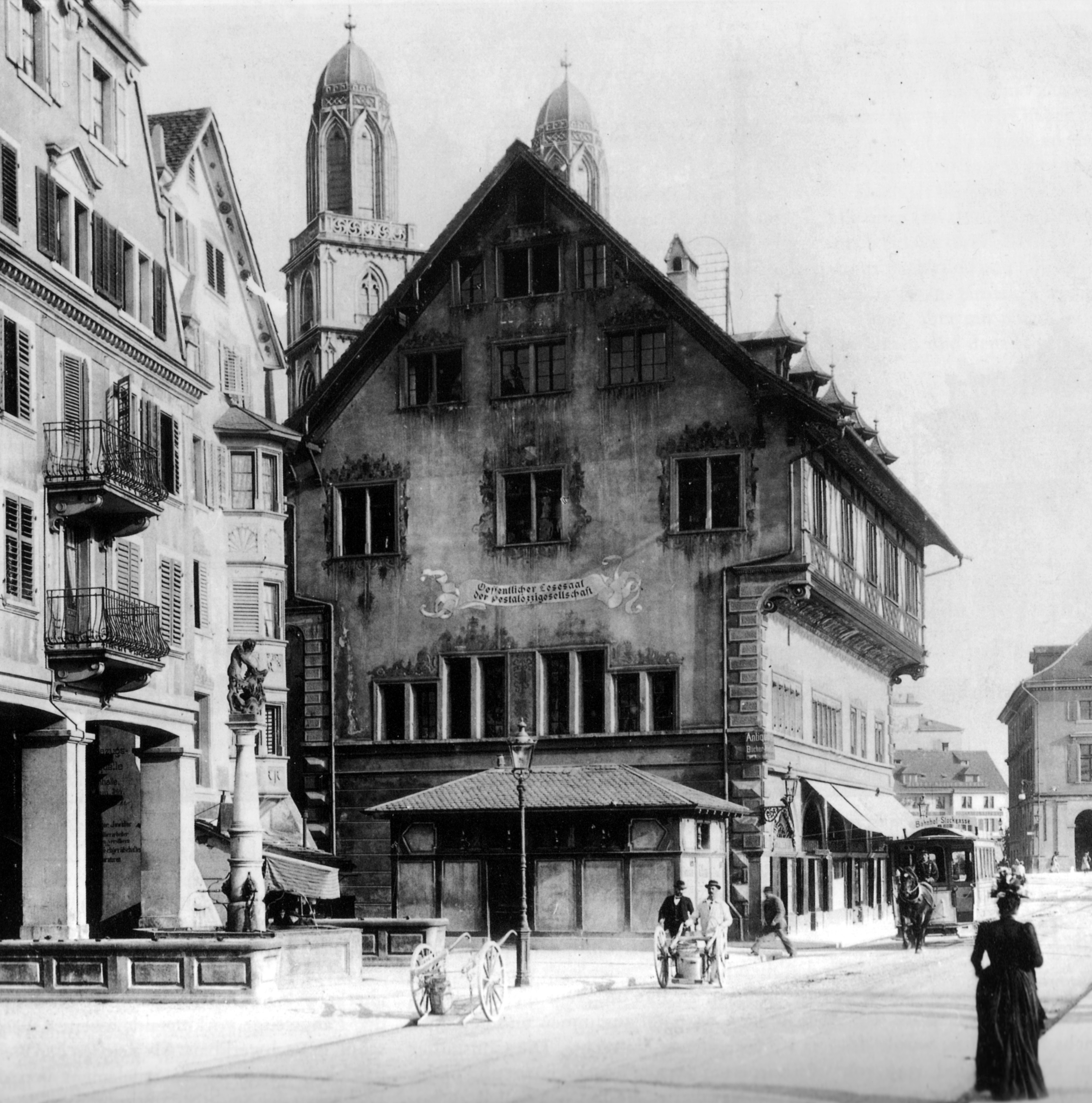 Das Zunfthaus zum Rüden am Limmatquai in Zürich um 1898